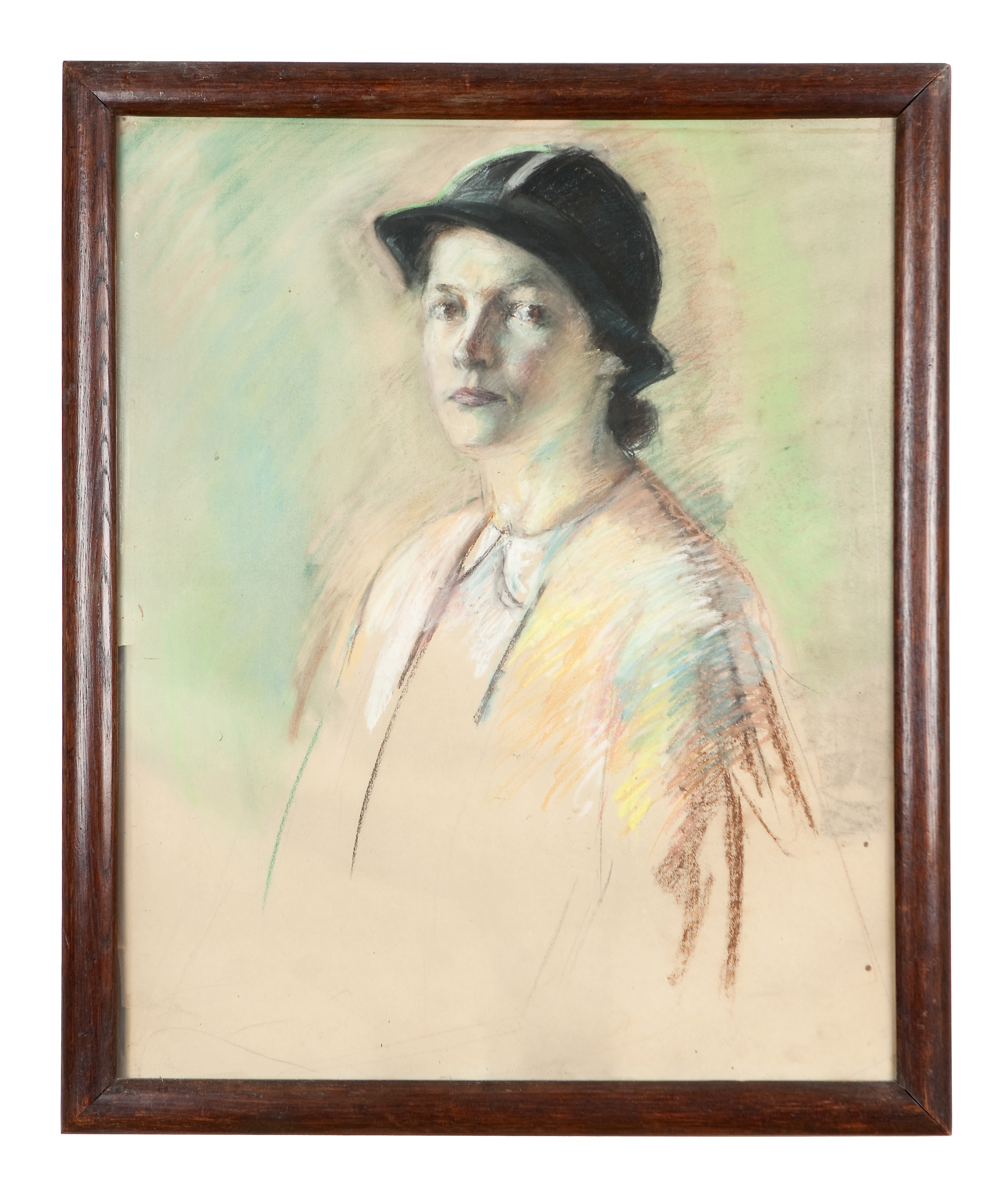 Портрет жены А.В.Ванециана. выполненный пастелью на картоне